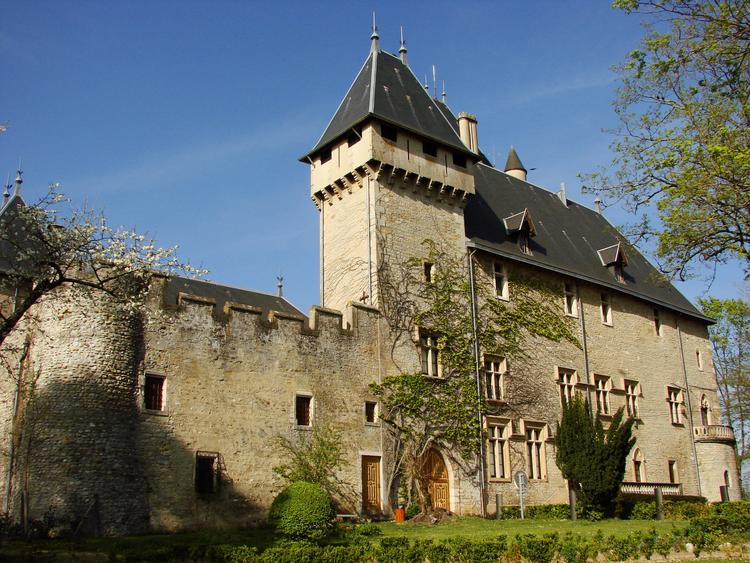 Vue du château de Chazey-sur-Ain